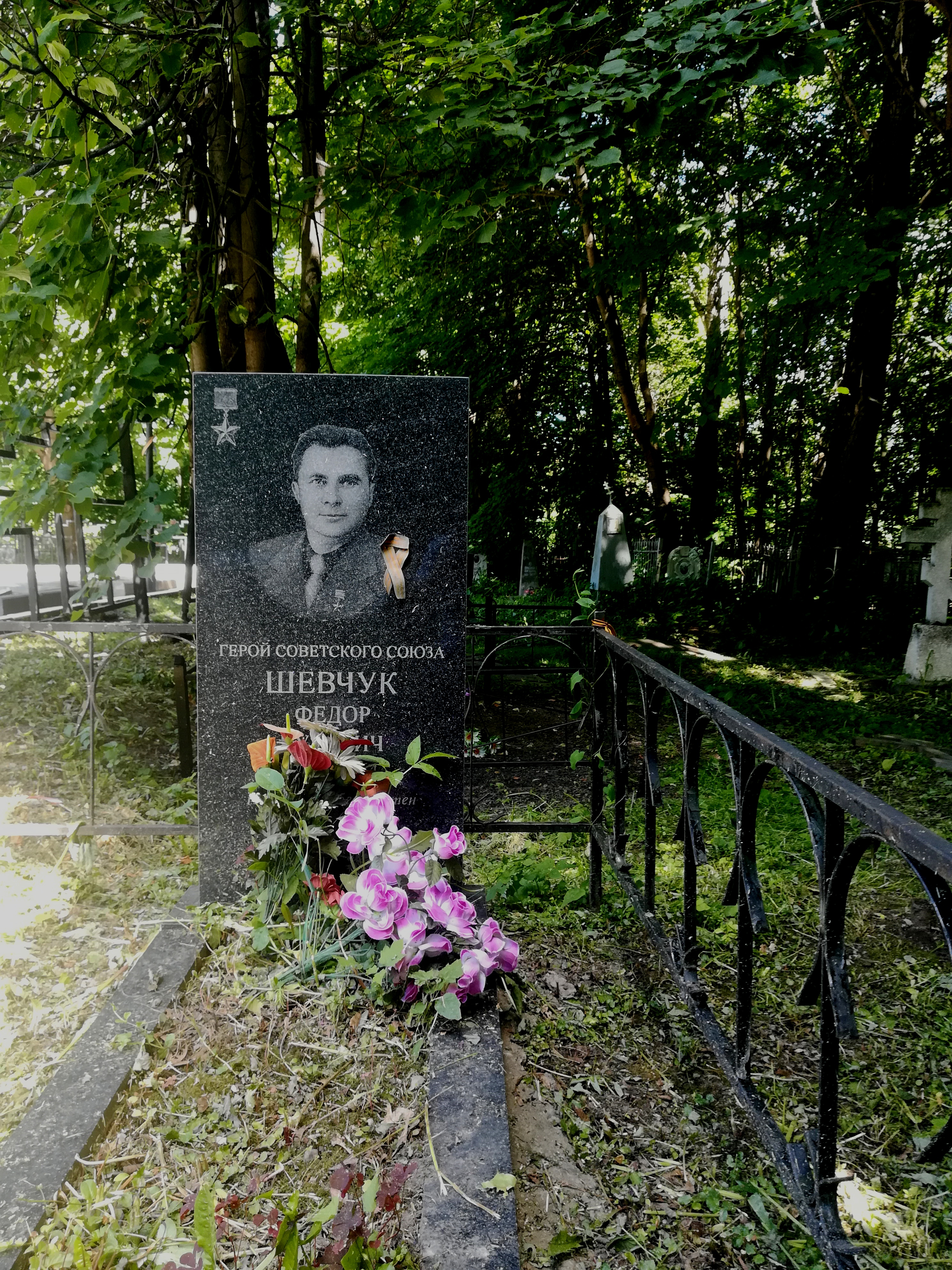 Владимир